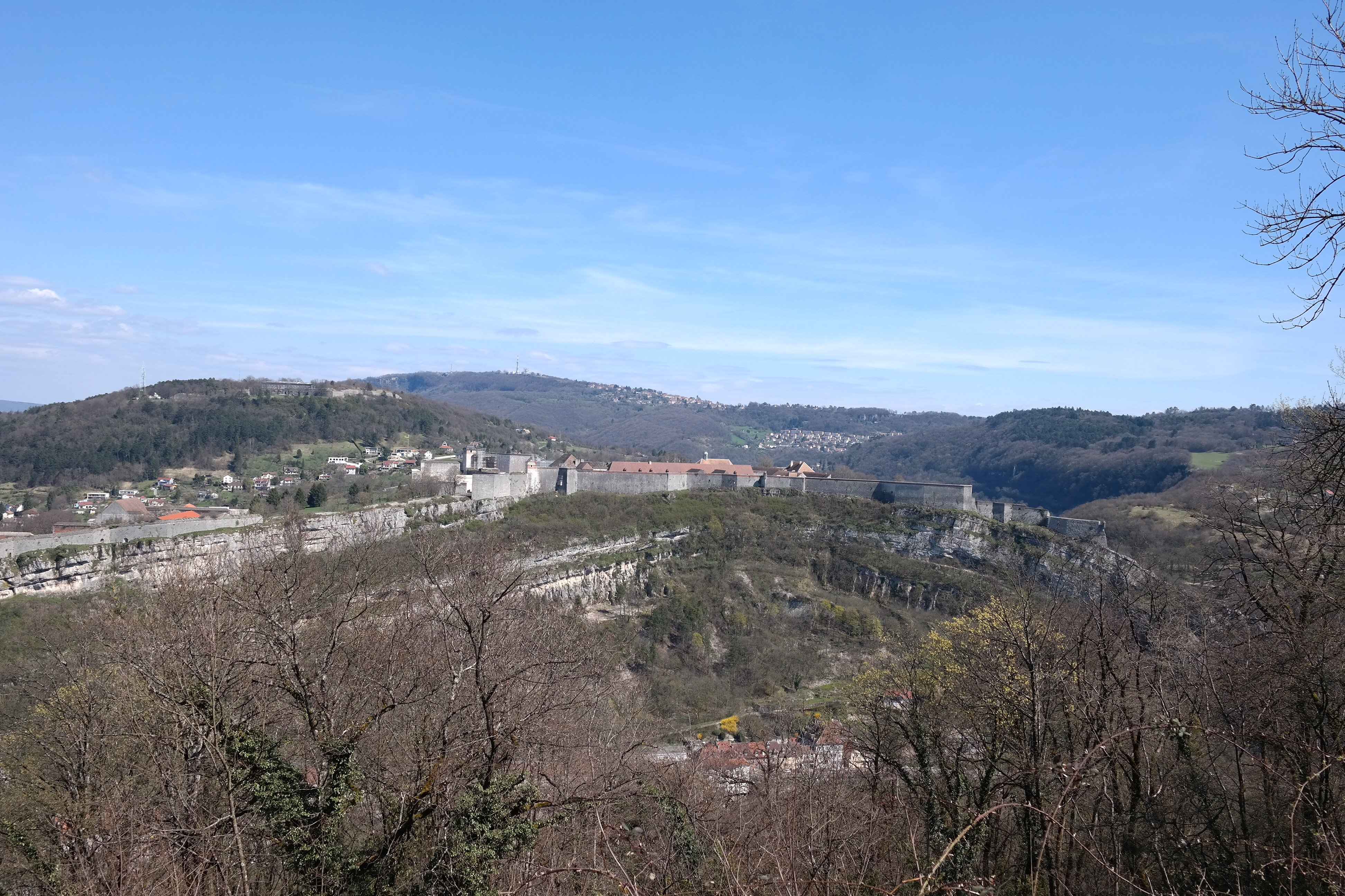 Citadelle de Besançon depuis le Fort de Chaudanne